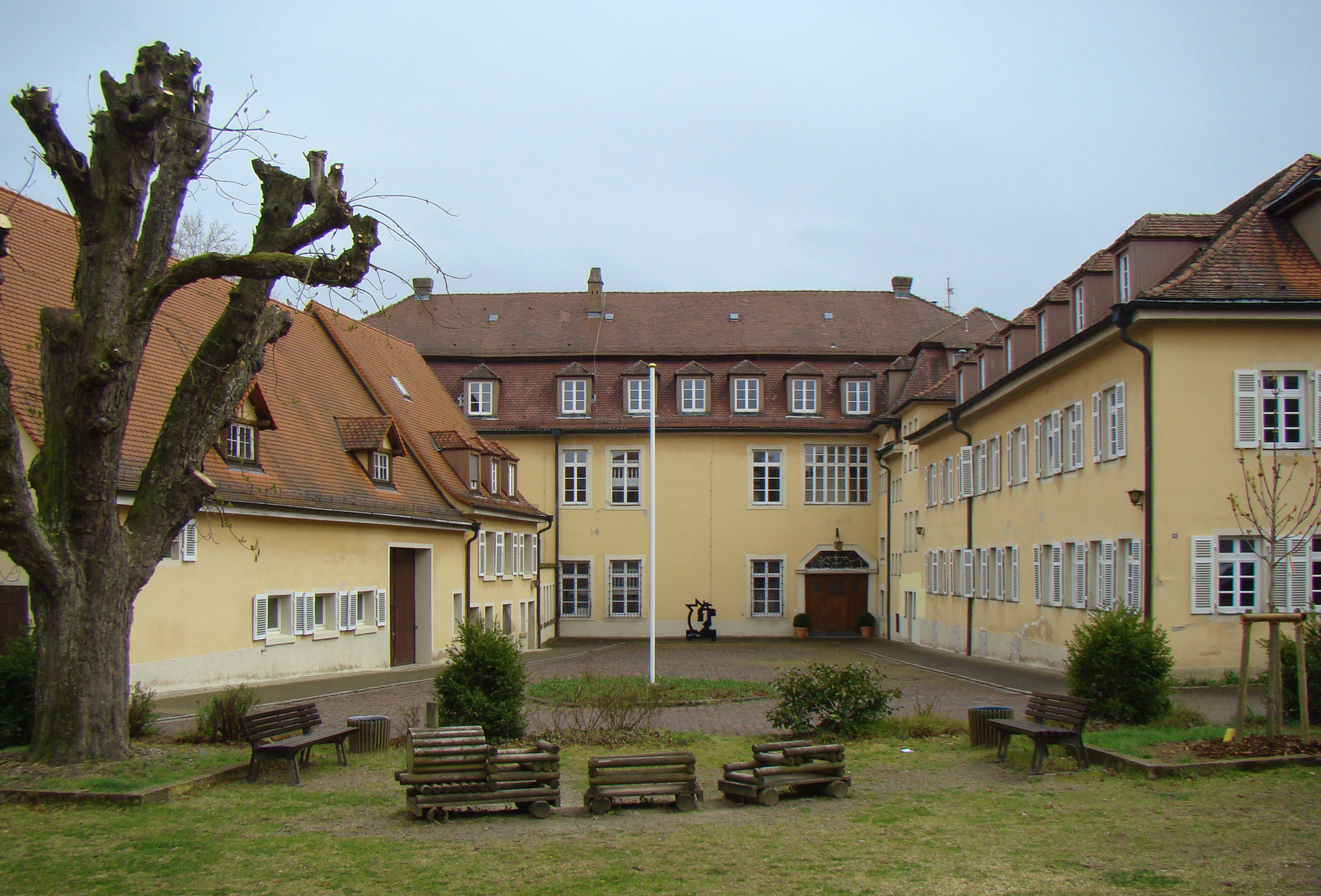 Graevenitzsches Schloss in Freudental (Lkr. LB)